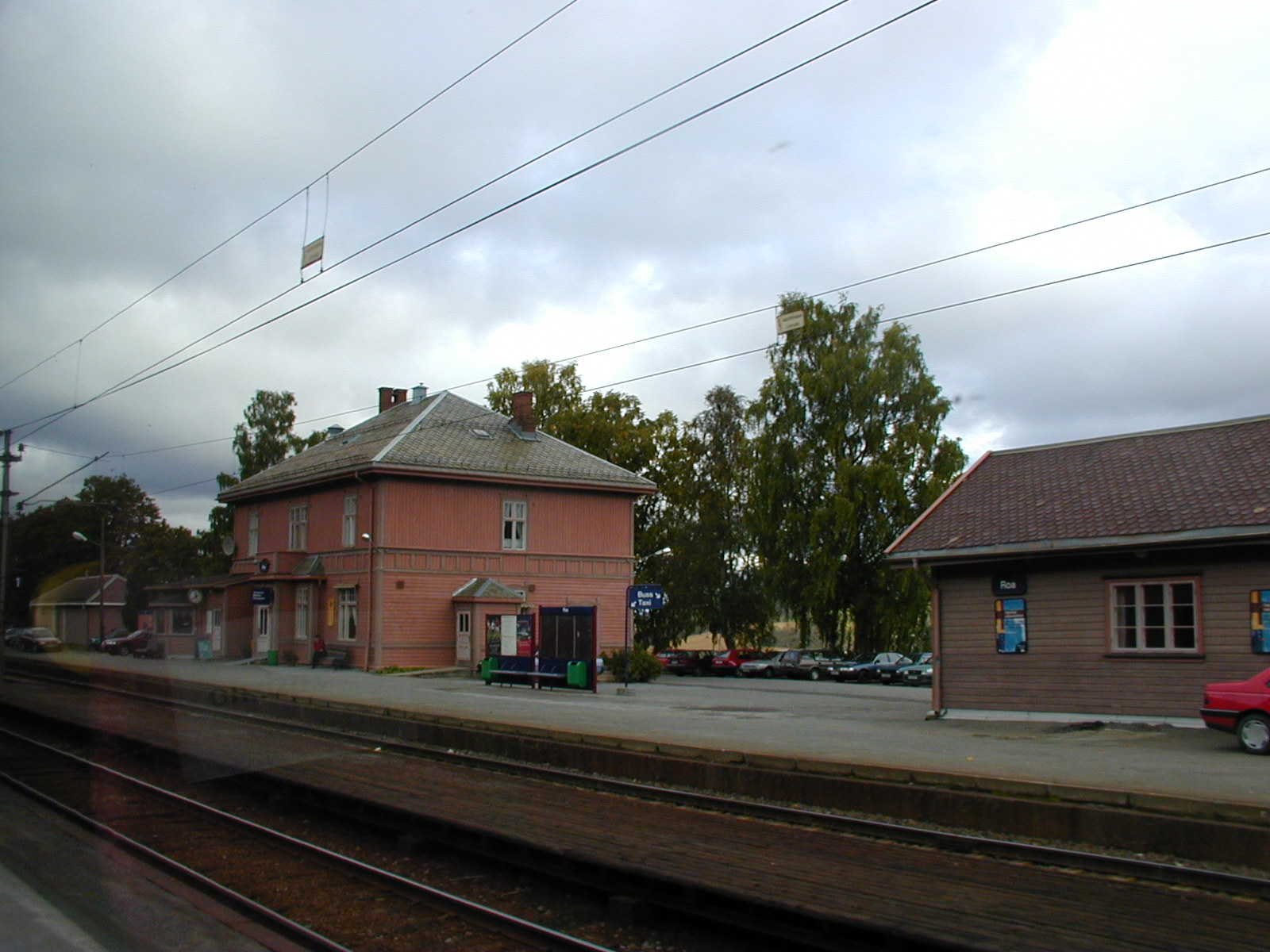 Roa stasjon